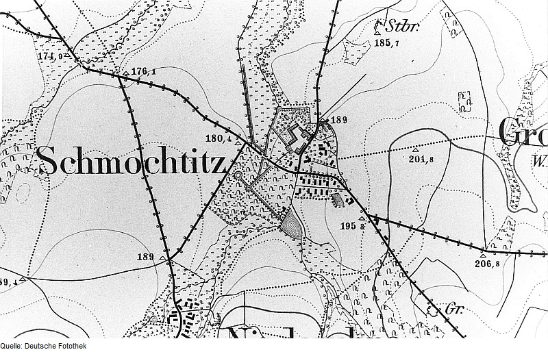 Original image description from the Deutsche Fotothek Bautzen-Schmochtitz. Meßtischblatt, Sekt. Luttowitz, 1884